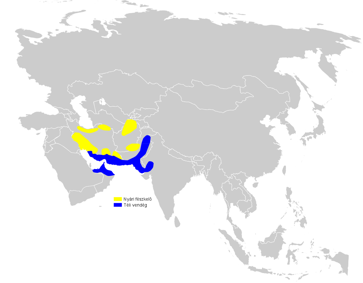 Phylloscopus neglectus distribution map, based on